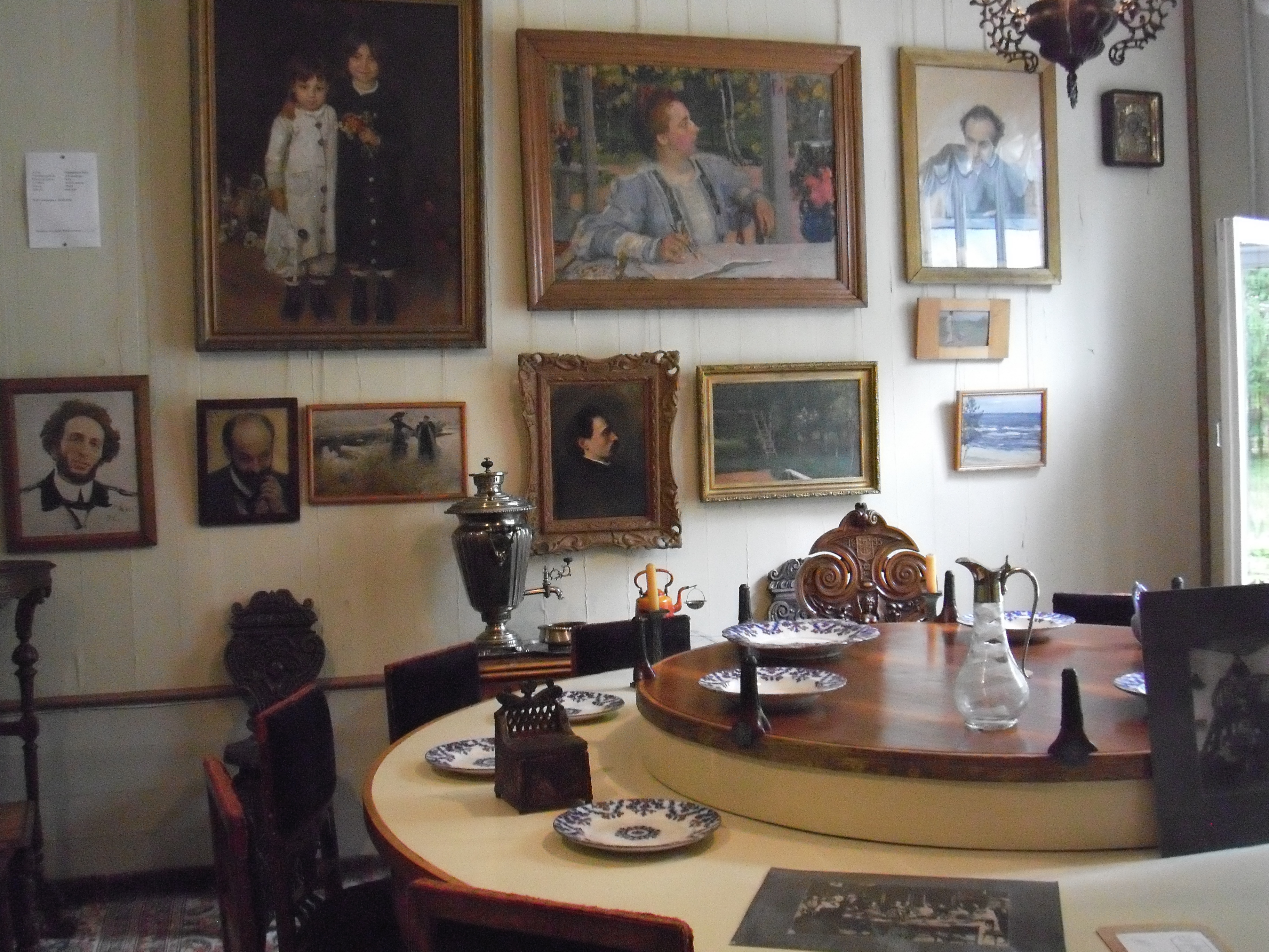 Усадьба "Пенаты" в п.Репино СПб. Интерьеры